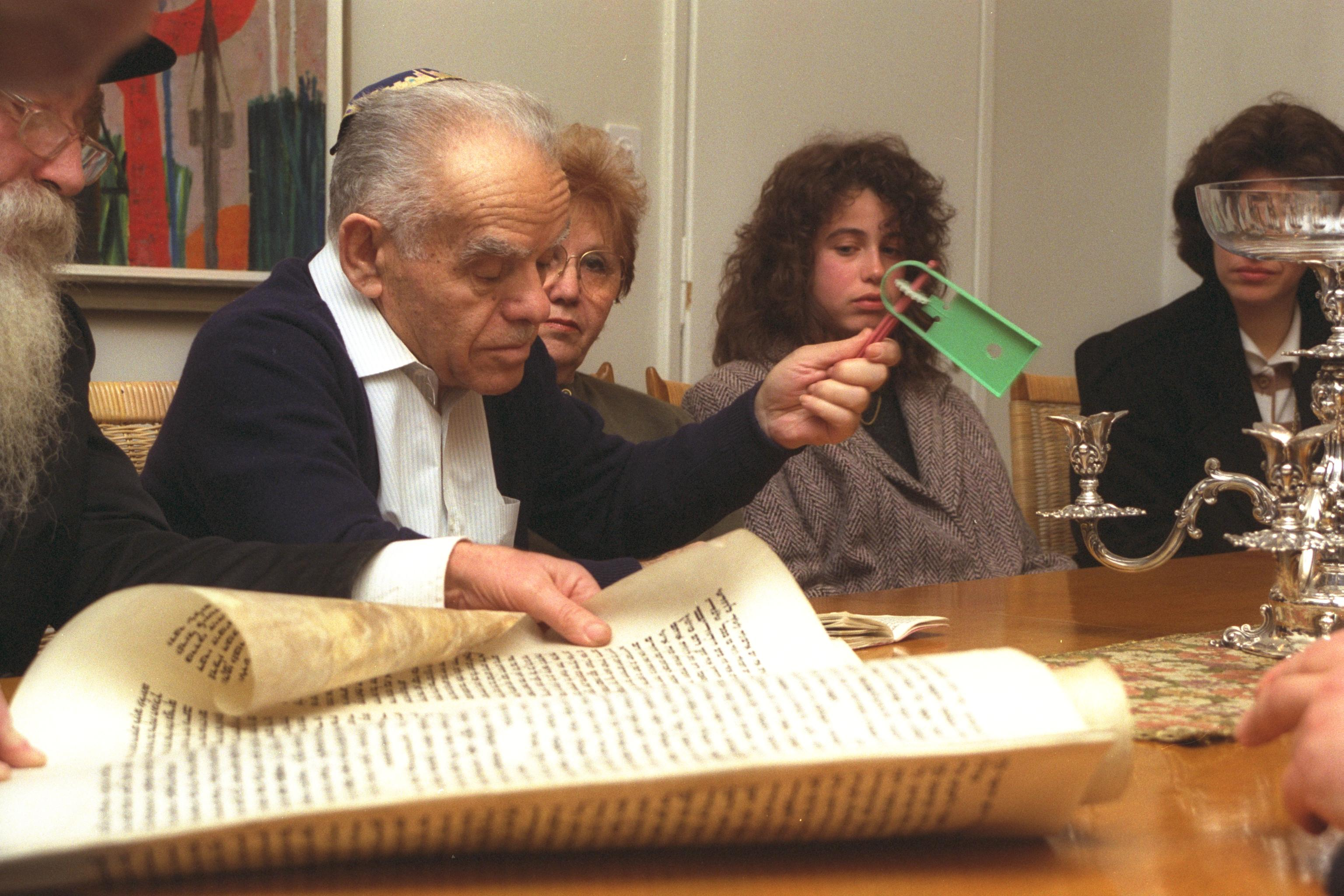 P.M. Yitzhak Shamir waving a noisemaker at the sound of Haman's name during a Megilla reading at his home in Jerusalem on Purim. ראש הממשלה יצחק שמיר מרעיש ברעשן בעת הקראת מגילת אסתר, בבית ראש הממשלה בירושלים. Photo: AYALON MAGGI, 02/28/1991